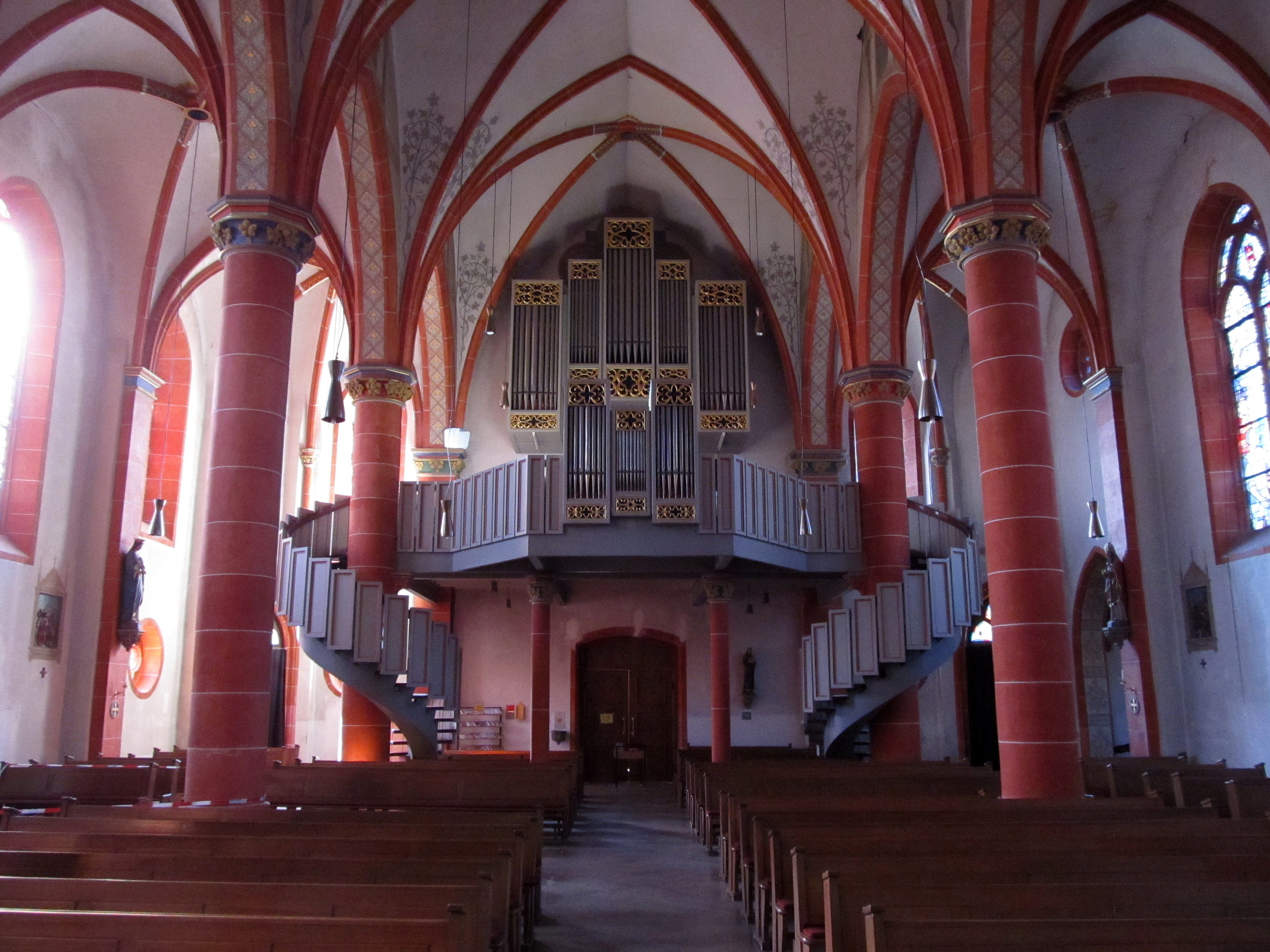 Blick ins Innere der katholischen Pfarrkirche Herz Jesu in Köllerbach, einem Stadtteil von Püttlingen, Saarland